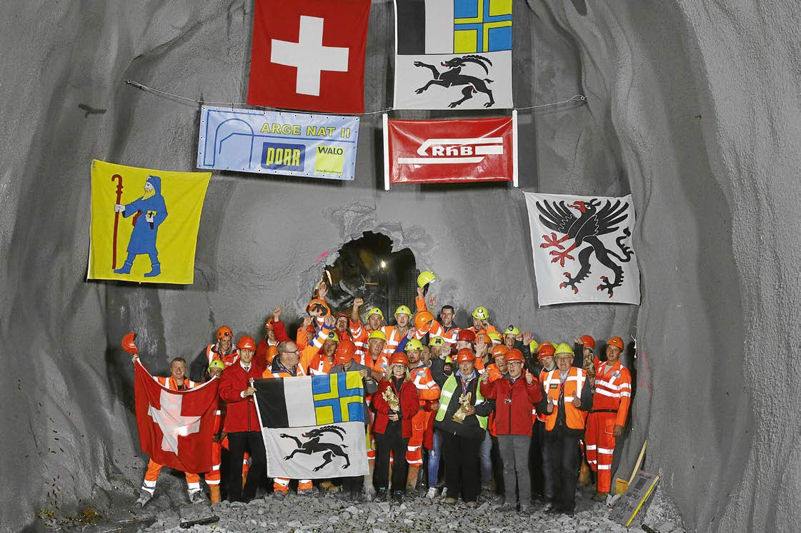 Neuer Albulatunnel, Durchschlagsfeier am 2. Oktober 2018